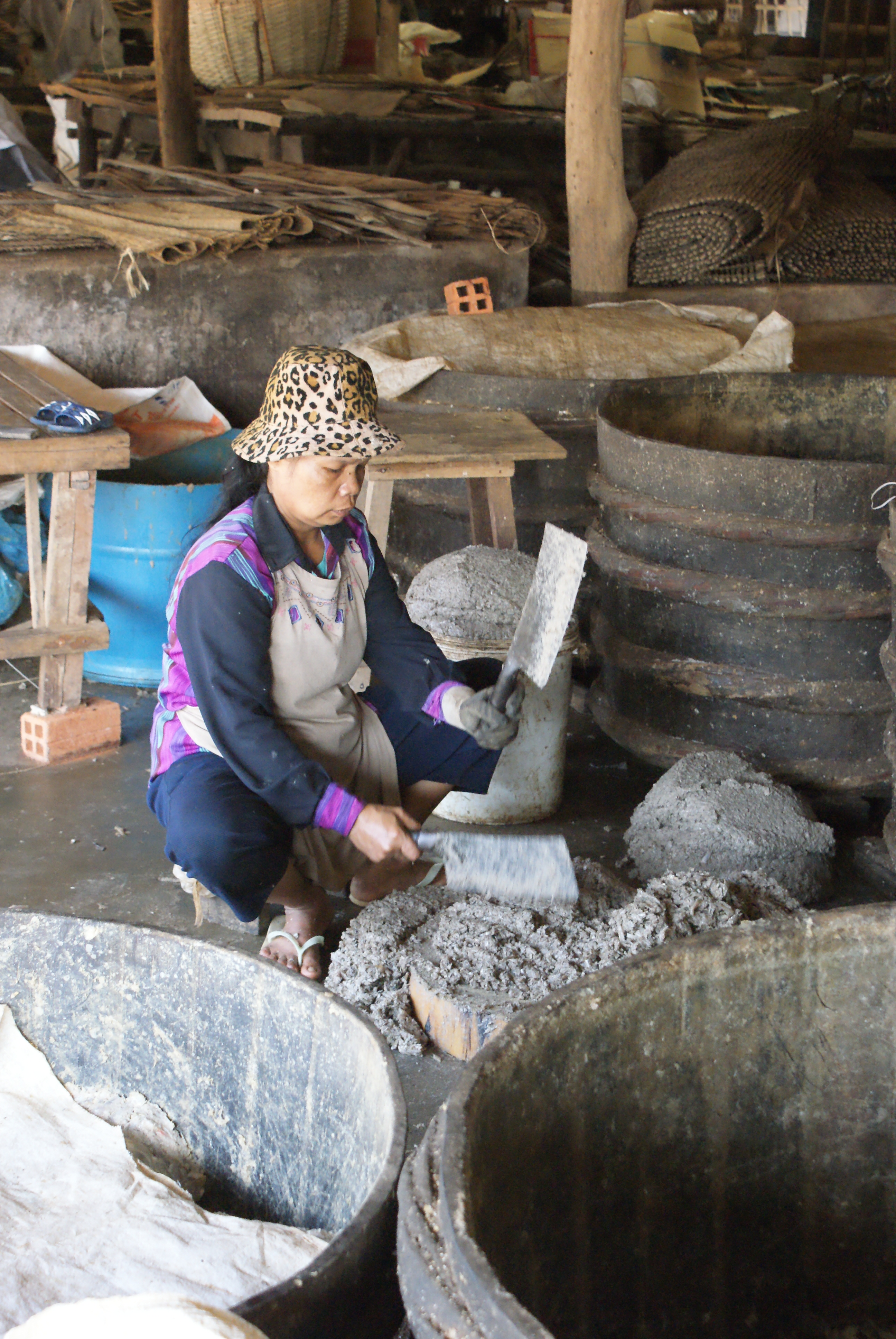 Woman making fish paste (Cambodia)